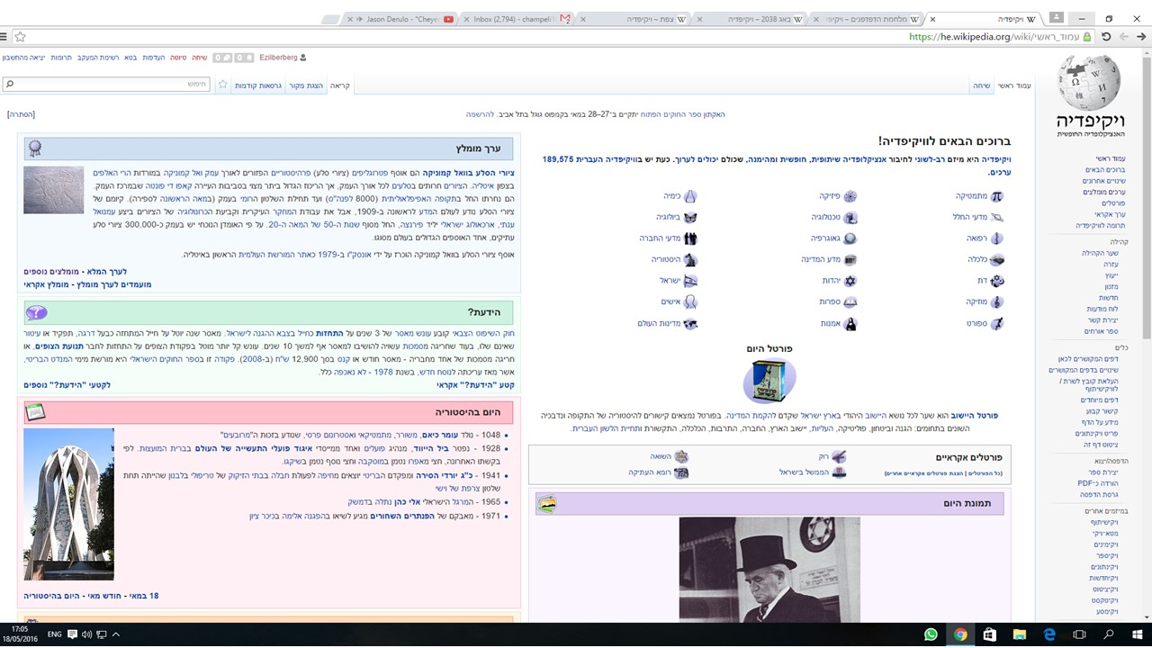 עמוד הבית של ויקיפדיה העברית בגוגל כרום גרסה 50 במערכת ההעפלה ווינדוס 10